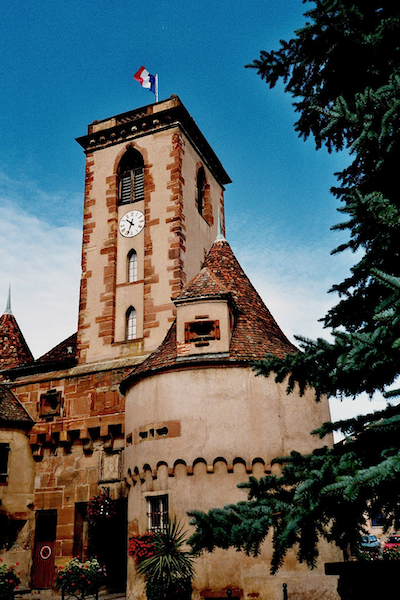 Wasselonne, France, Bas-Rhin, la tour du château.